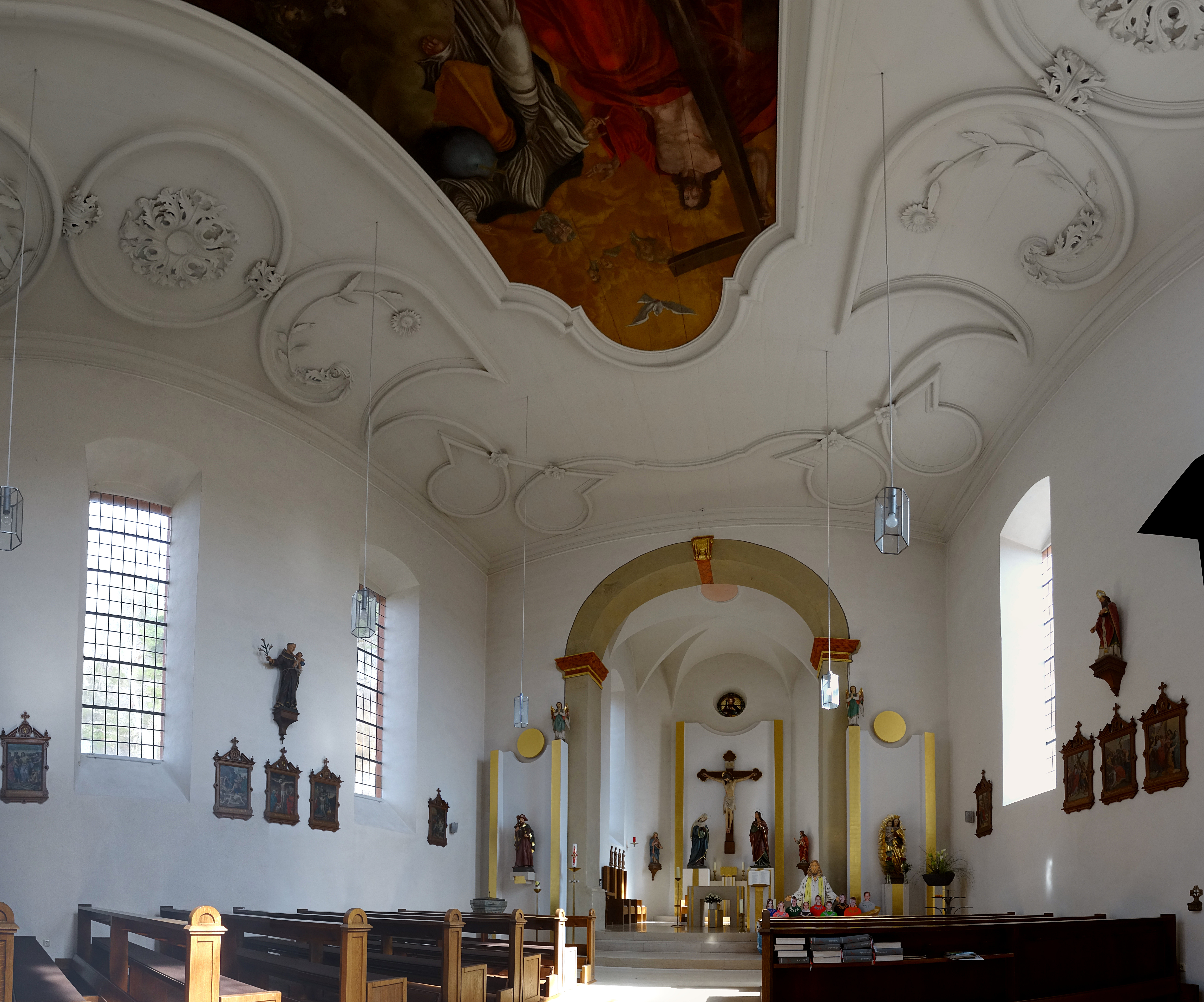 Pfarrkirche Sankt Jakobus der Ältere (Heufurt) von 1710 am Jakobus-Nebenweg Rhön und Grabfeld